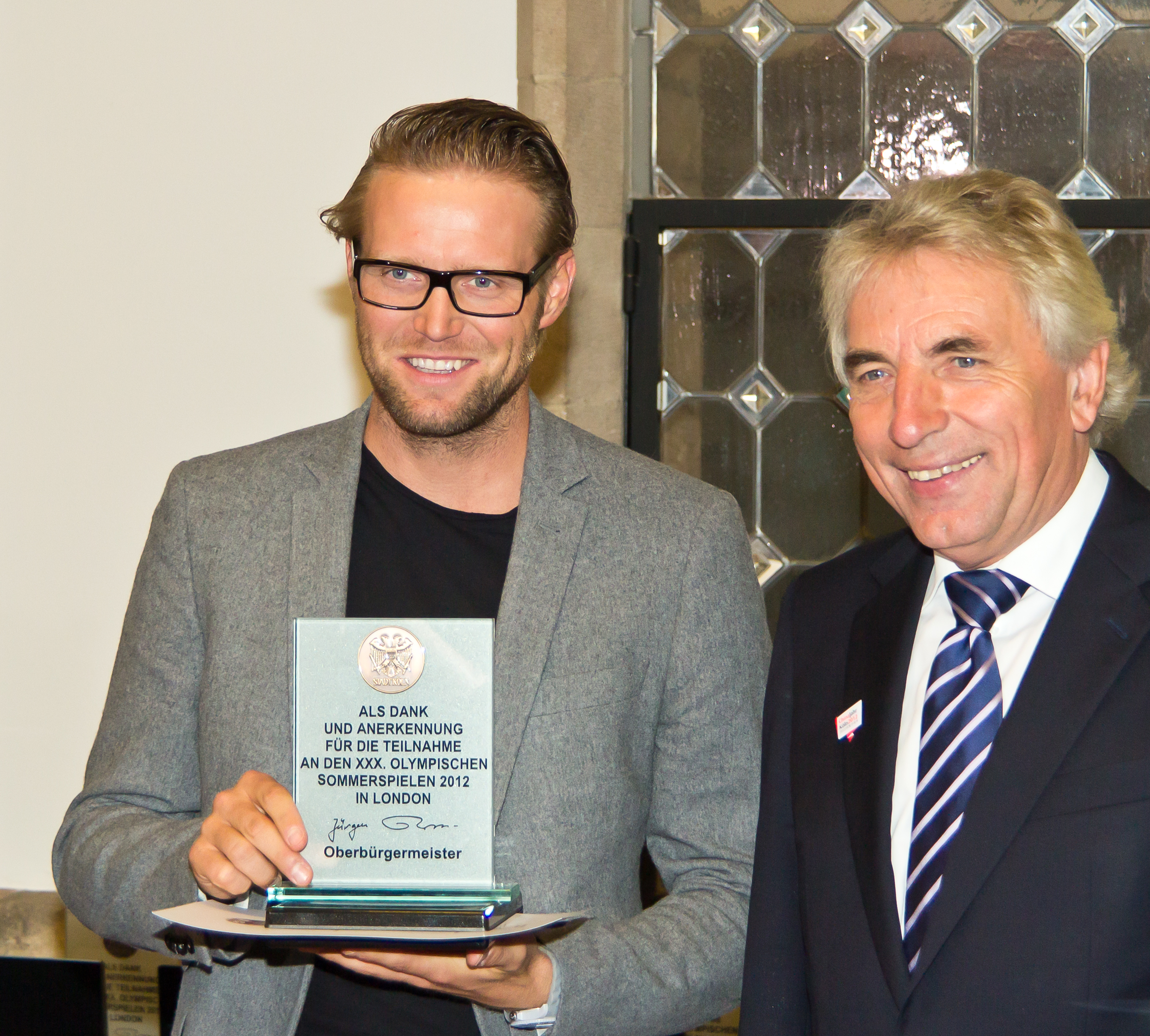 Empfang und Ehrung durch den Kölner Oberbürgermeister Jürgen Roters für Kölner Olympioniken und Paralympics-Athleten im Hansasaal des Historischen Rathauses von Köln Foto: Julius Brink, Gewinner der Goldmedaille im Beachvolleyball bei den Olympischen Sommerspielen 2012 in London (links) mit Urkunde und Plakette der Stadt Köln und Kölns OB Jürgen Roters (rechts)